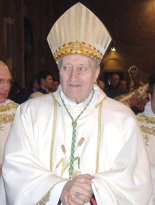 Bishop of Lodi